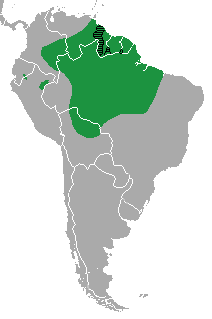 Deroptyus accipitrinus